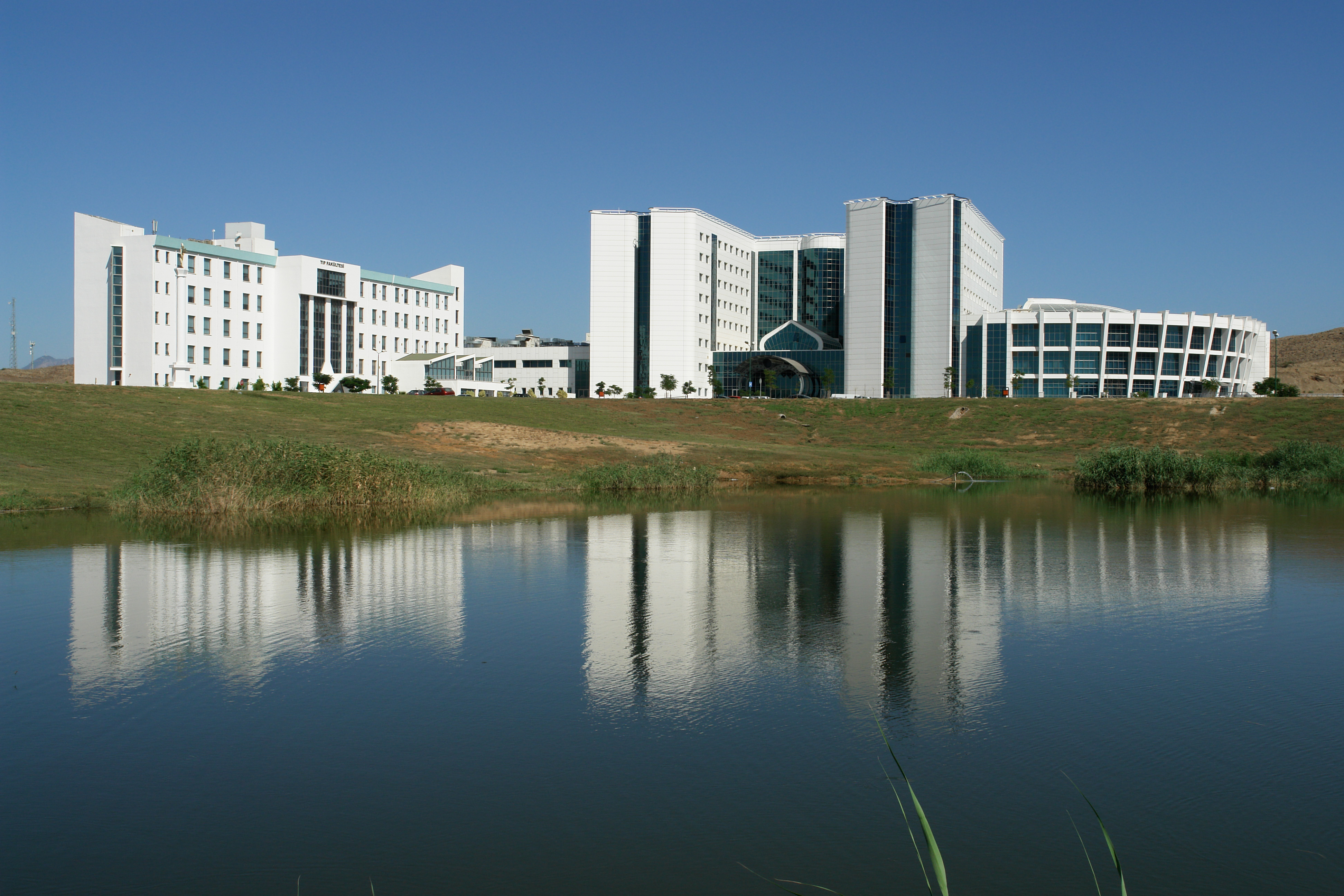 Yakın Doğu Üniversitesi Hastanesi ve Tıp Fakültesi.